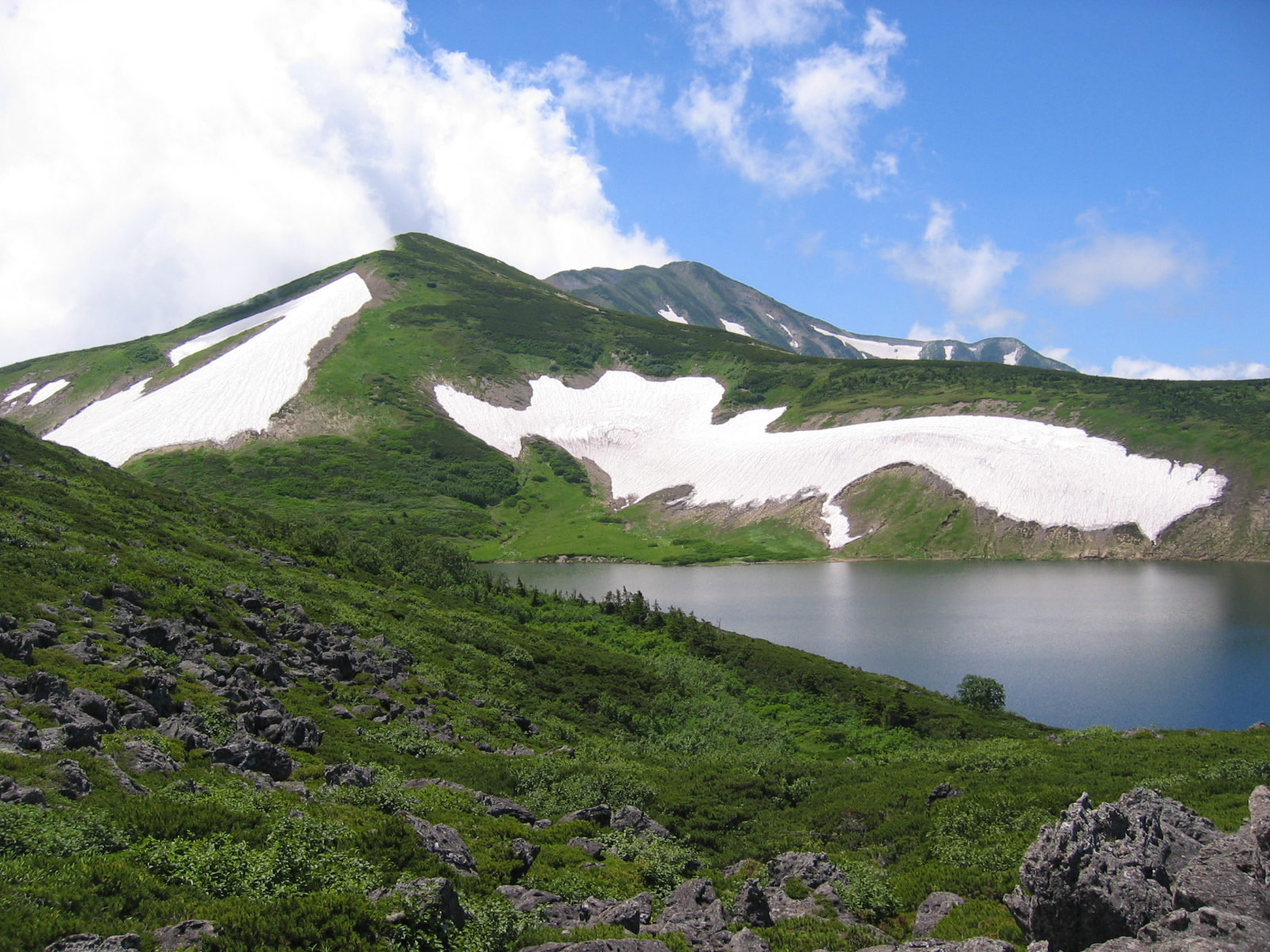 白馬大池と小蓮華山